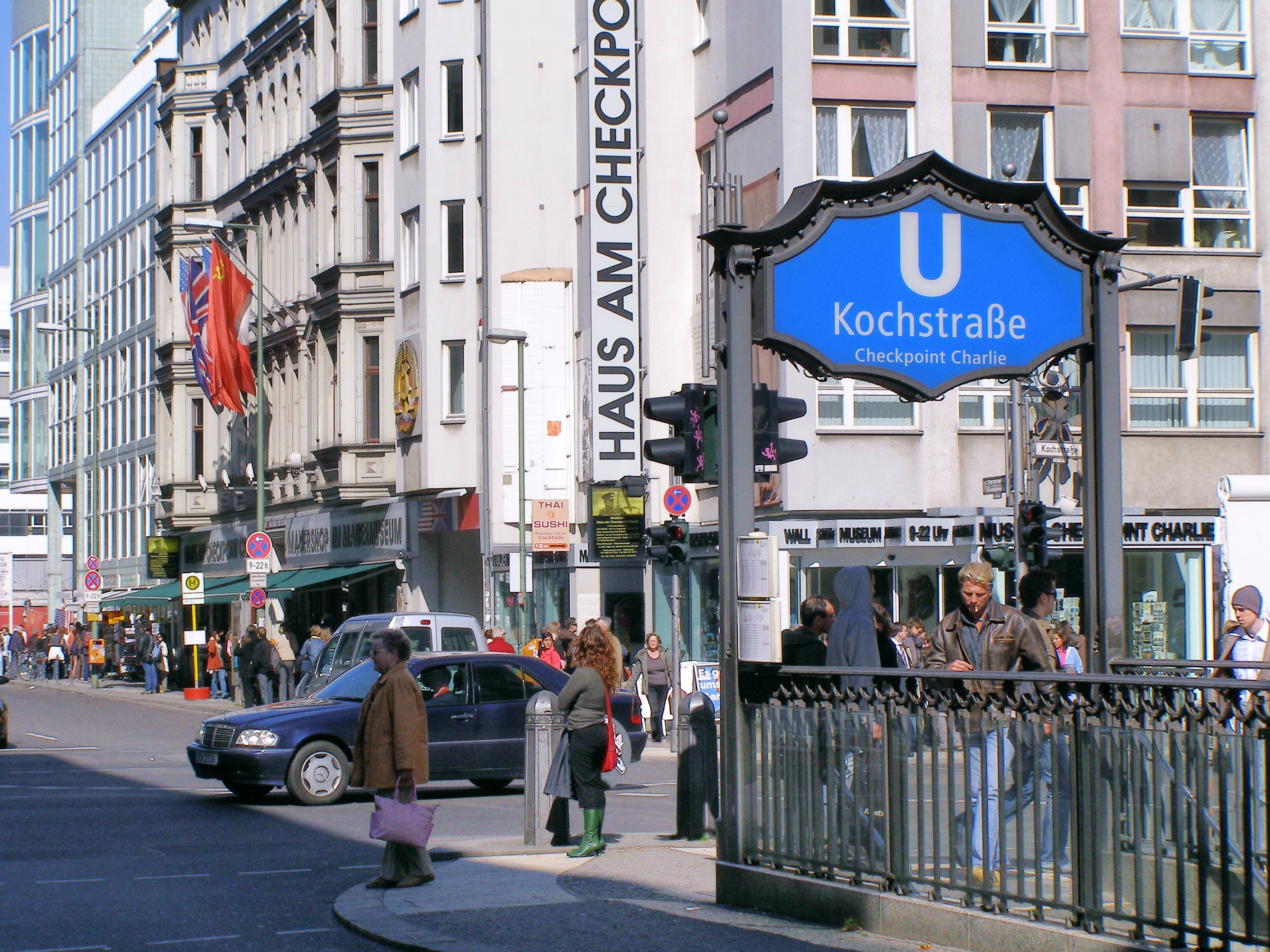 U-Bahnhof Kochstraße, Berlin (im Hintergrund das Haus am Checkpoint Charlie) underground station Kochstraße, Berlin (in the background the museum Haus am Checkpoint Charlie)